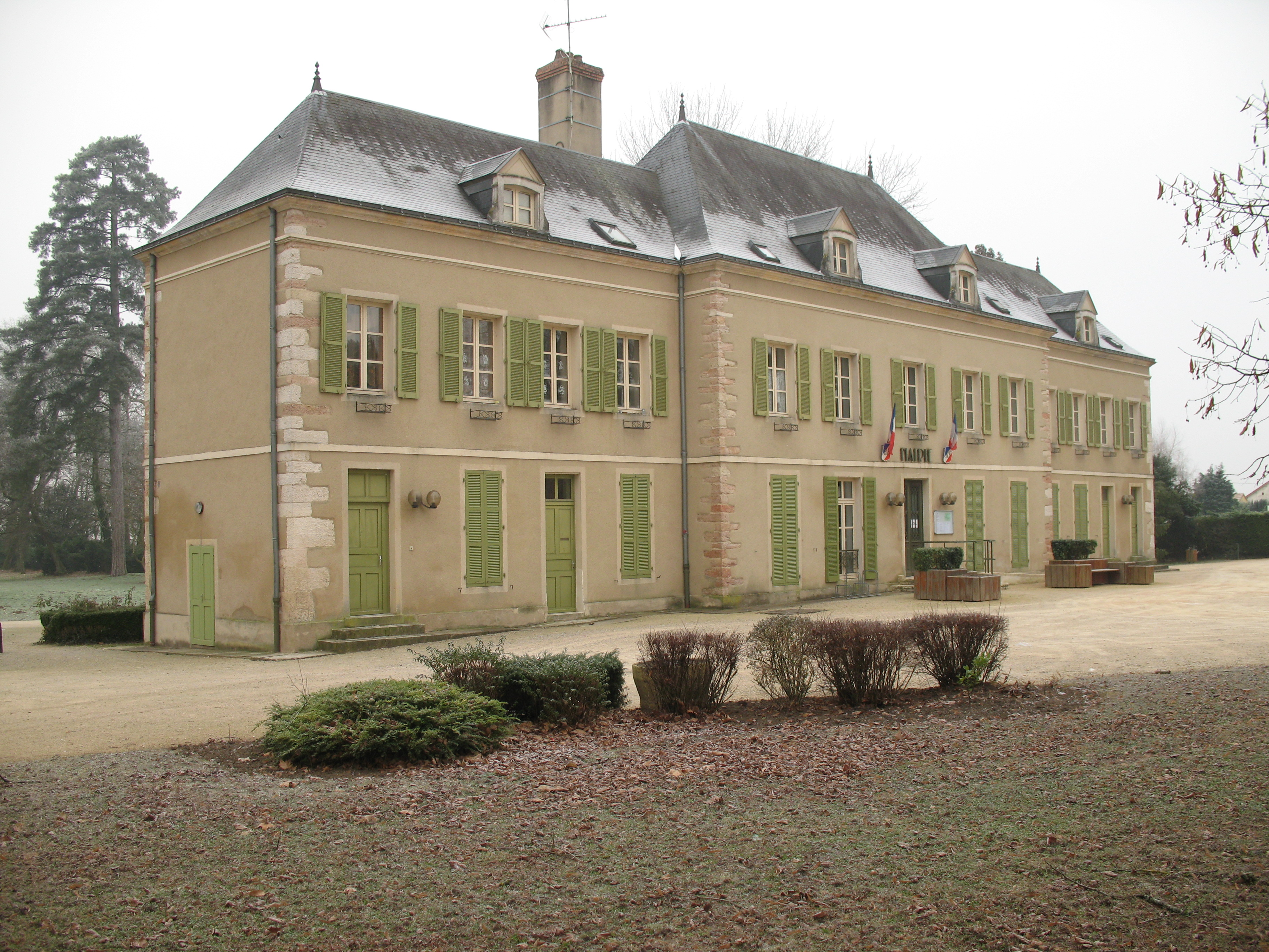 Château de Châtenoy à Châtenoy-en-Bresse dans la Saône-et-Loire